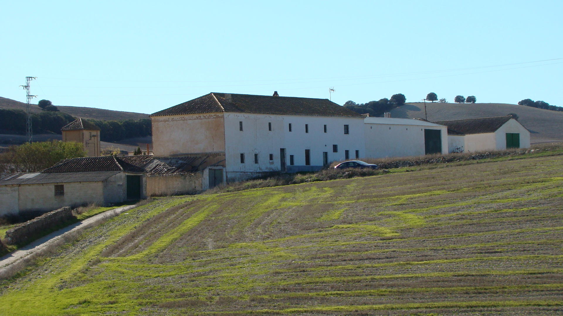 Cortijo o casería de cereal cerca de Píñar (Granada - España)